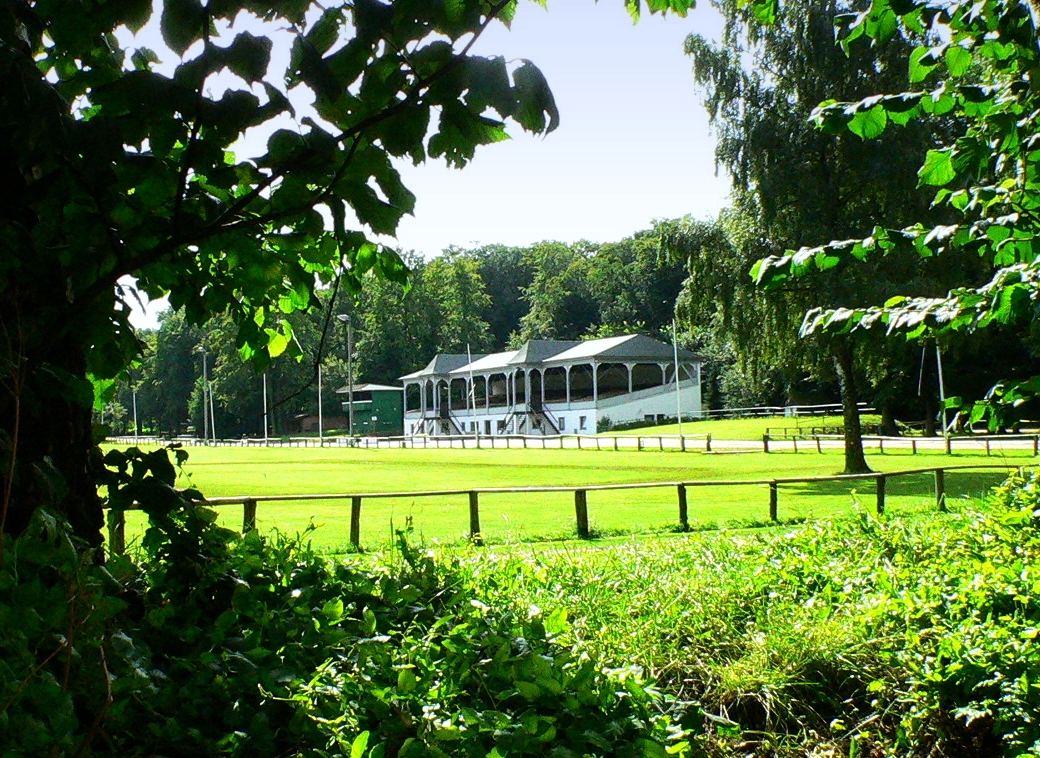 Historische Tribüne auf dem Landesturnierplatz Schleswig-Holstein in Bad Segeberg, Germany